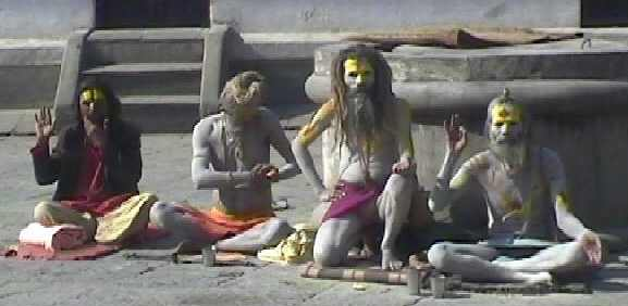 Йоги у храма ПашупатиЙоги у храма Пашупати в Непале